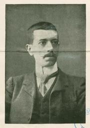 Sidney Kilner Levett-Yeats